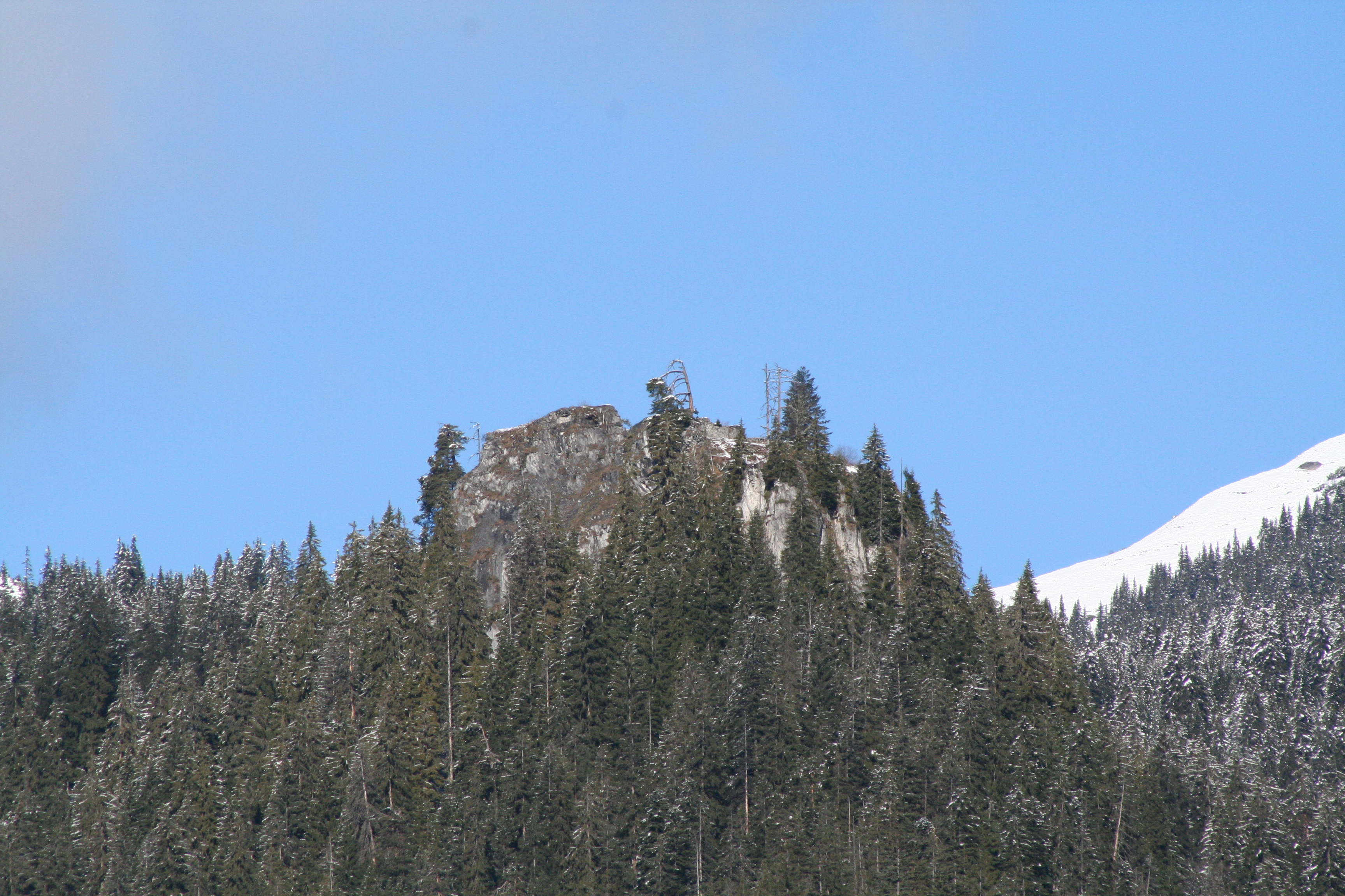 Hügel der Burg Belmont, Ansicht von Süden